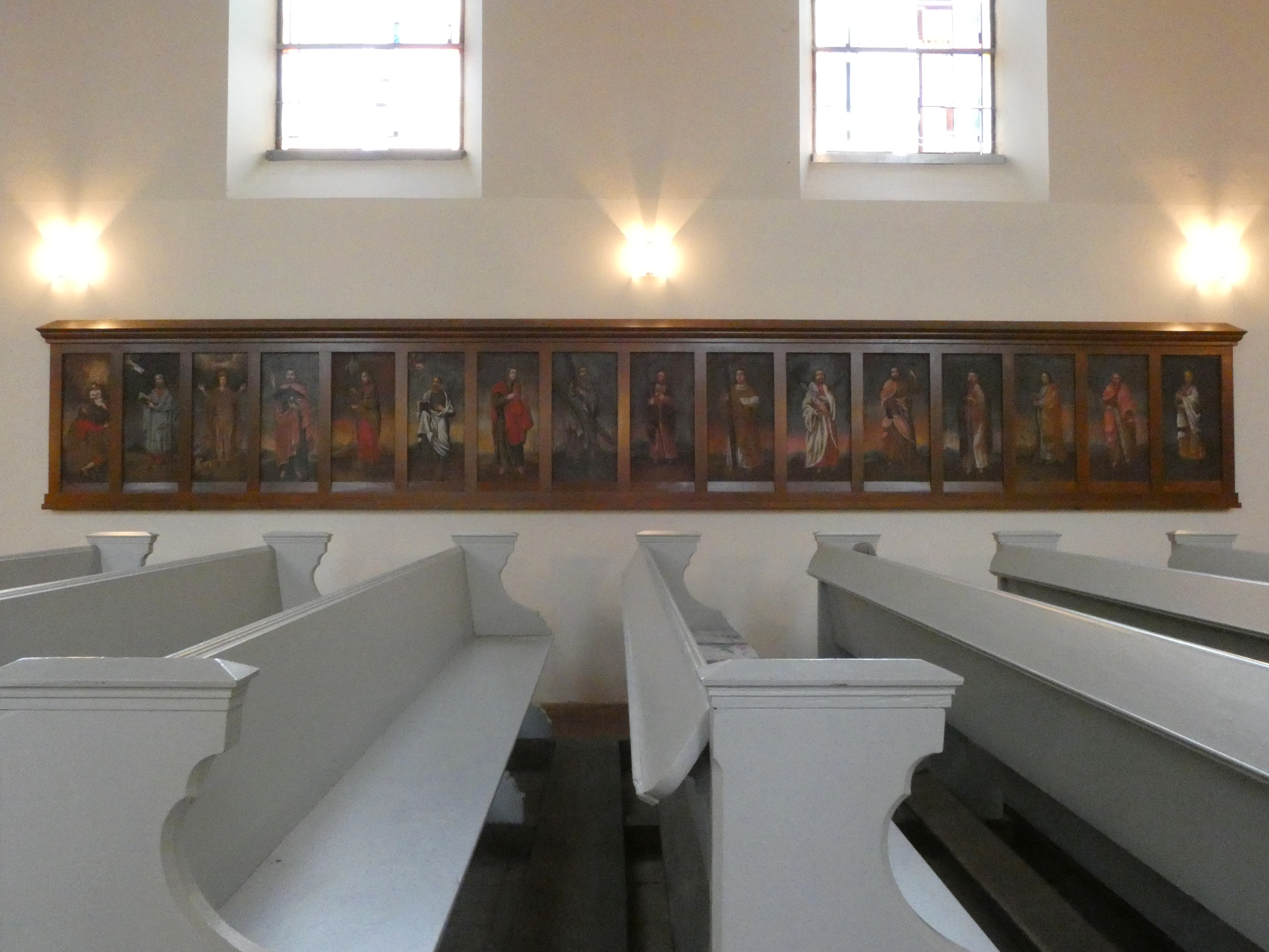 Bildtafeln Dorfkirche Klein Kreutz